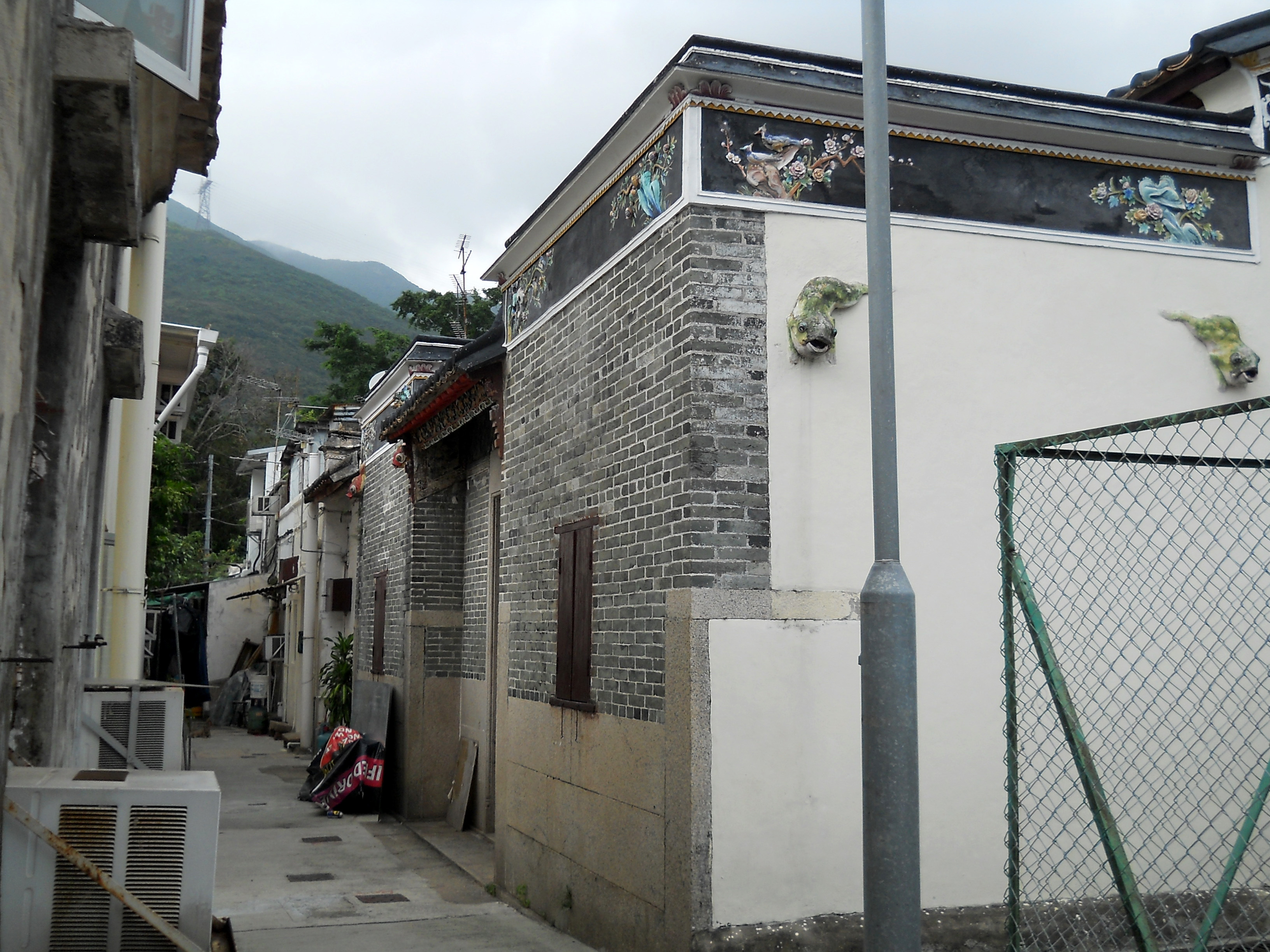 中文（香港）: 黃竹坑新圍舊民居